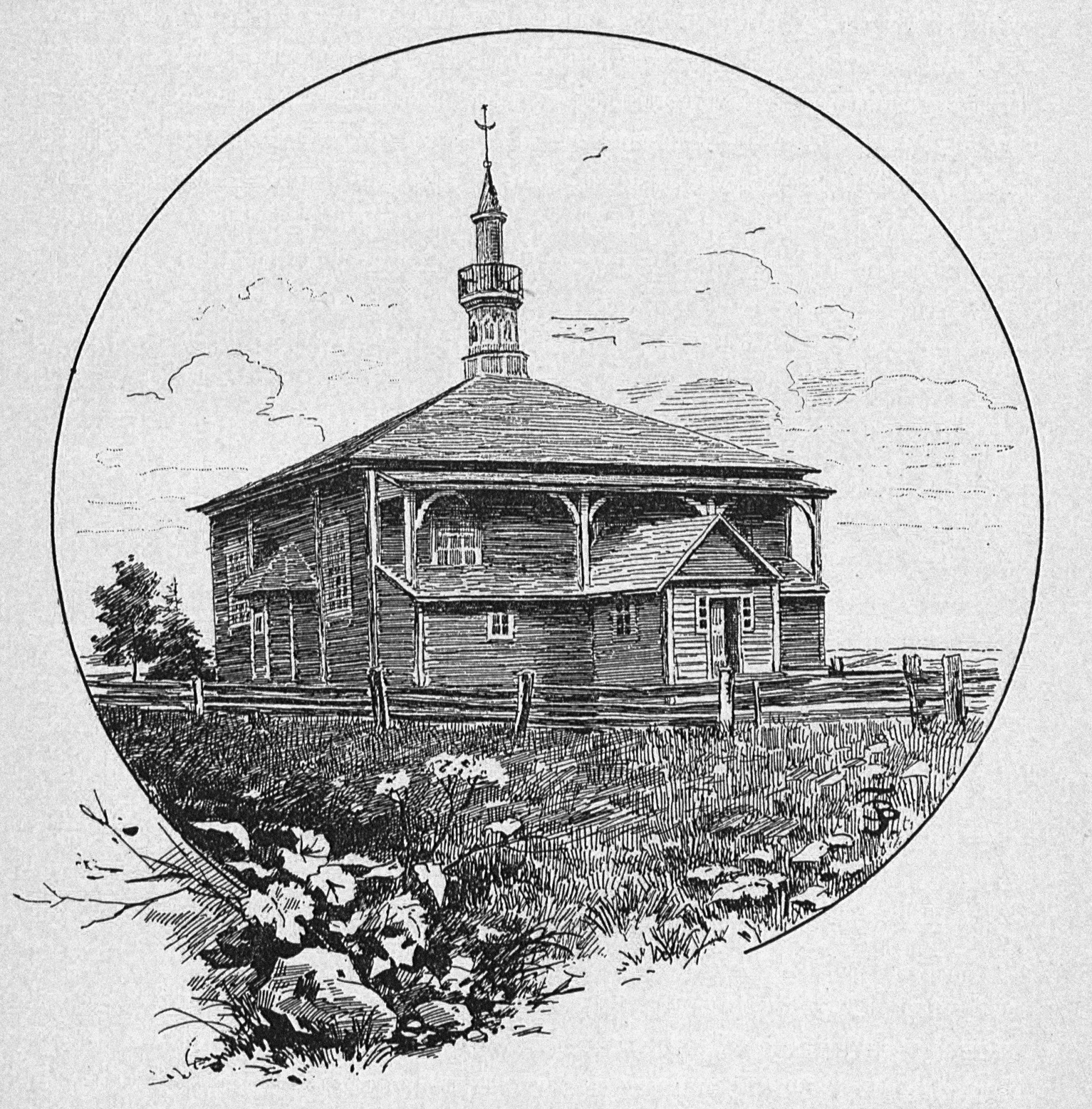 Беларуская (тарашкевіца): Іўе (Iŭje), вуліца Наваградзкая (vulica Navahradzkaja). Татарскі мячэт